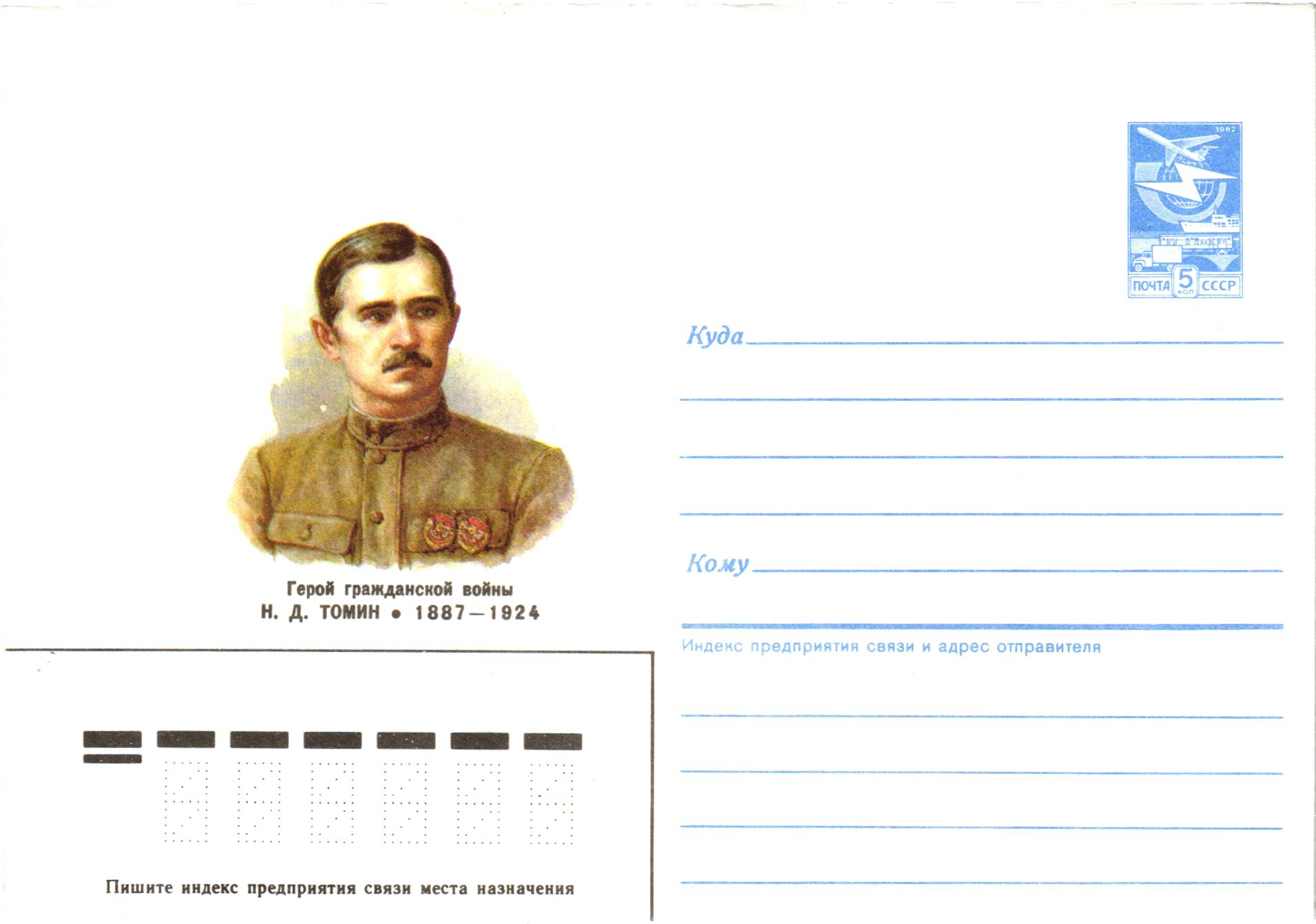 Томин Николай Дмитриевич, почтовый конверт